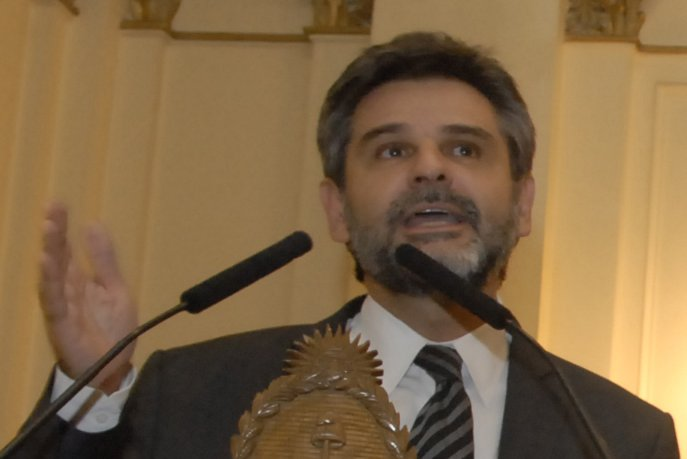 Daniel Filmus. Ministro de Educación de Argentina. En Casa Rosada, Salón Sur , durante la presentación del canal educativo "Encuentro".